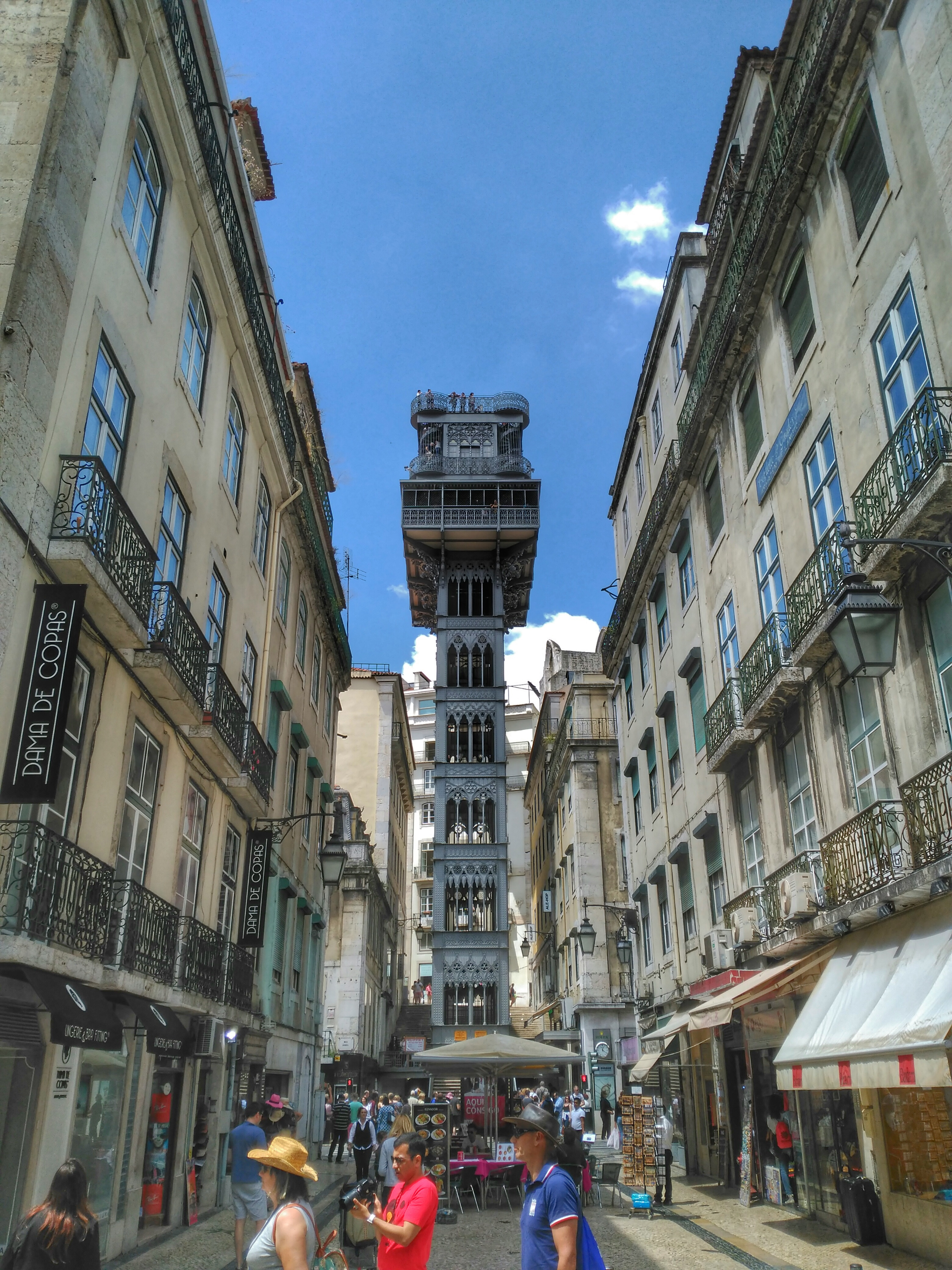 Santa Justa lift / Elevador de Santa Justa